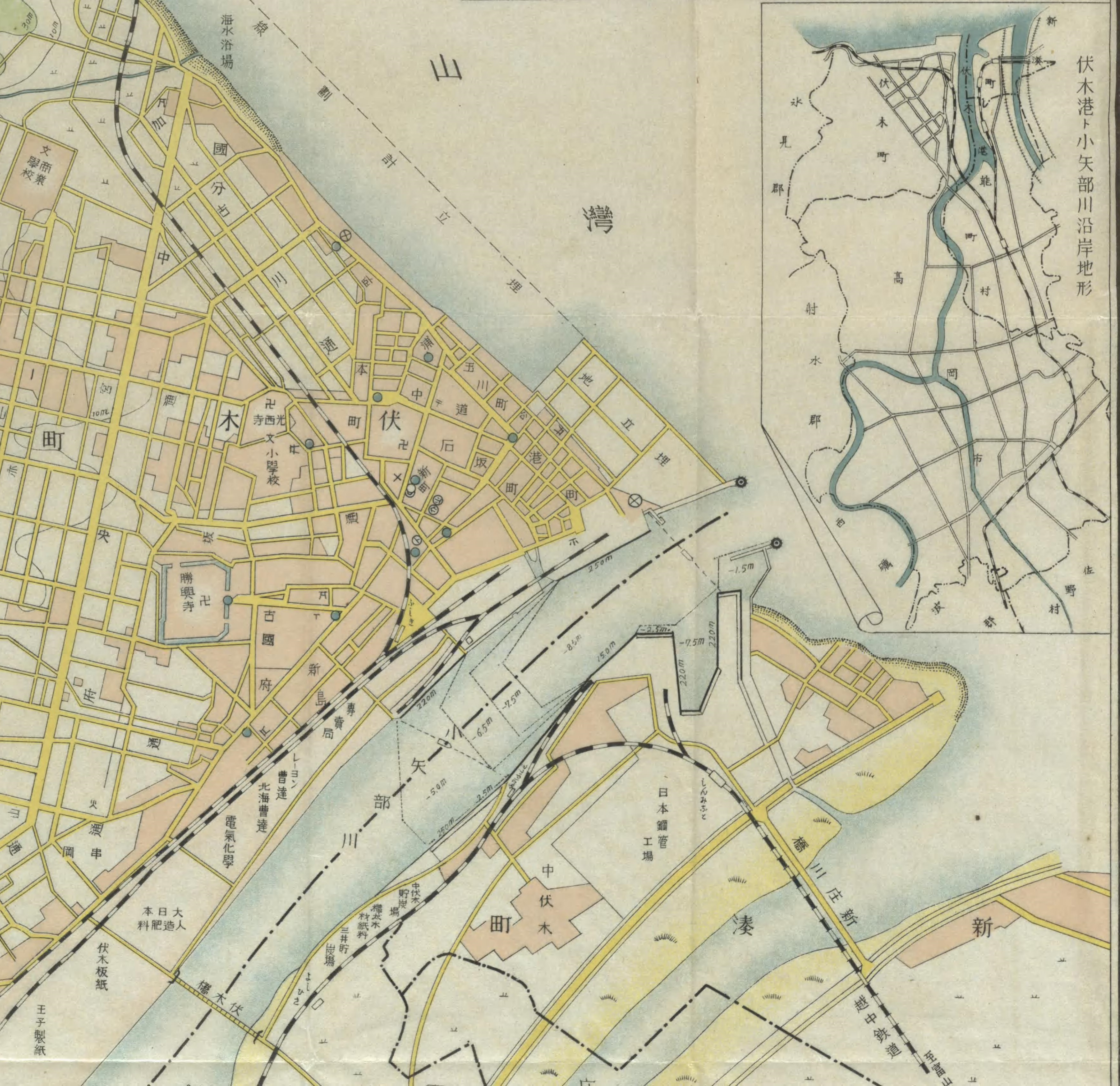 伏木駅より伸びる専用鉄道等を確認し得る